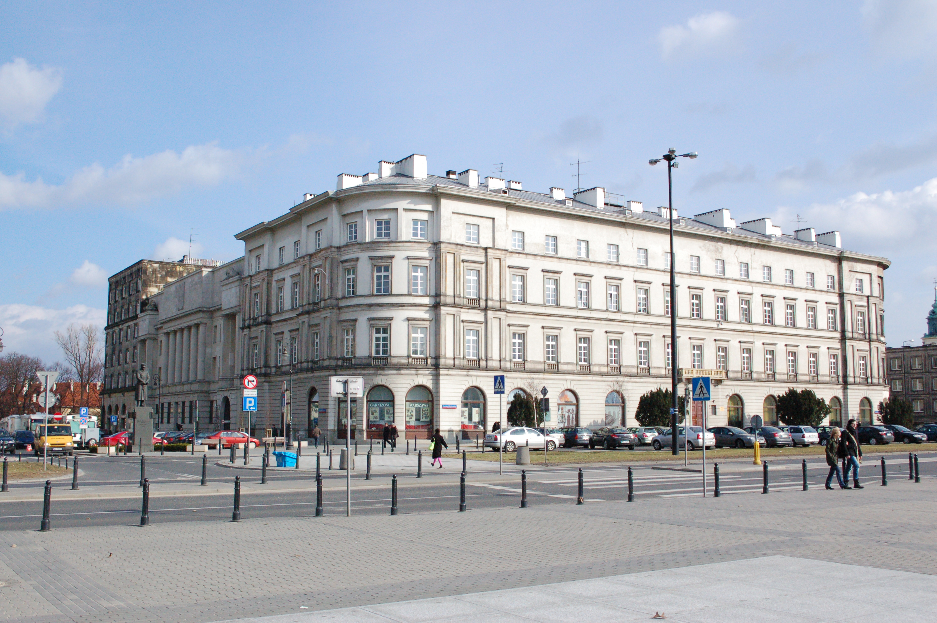 Haus ohne Kanten, Warschau